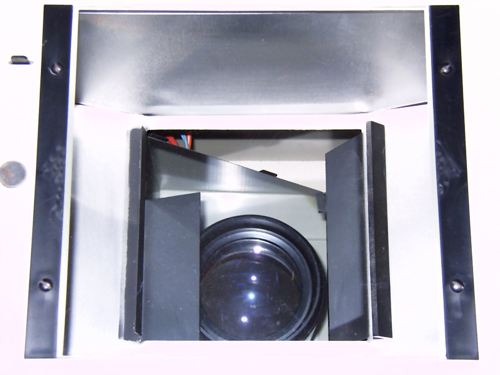 Umlenkspiegel und Projektionsobjektiv eines Episkops